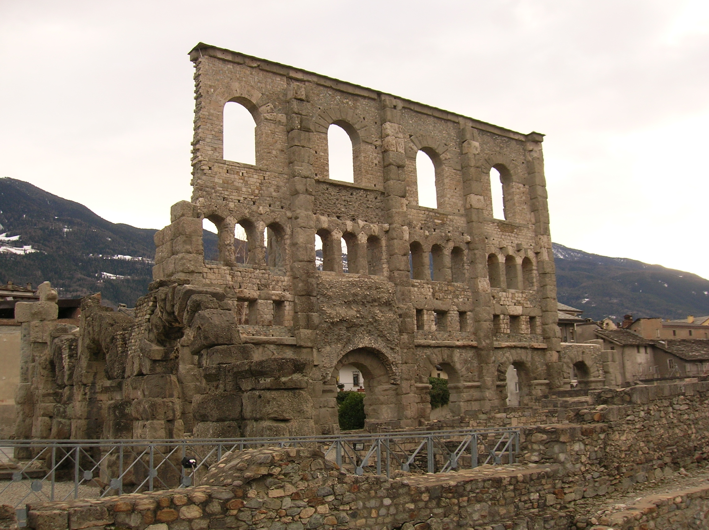 Théâtre et lumières", lo spettacolo di luci e suoni sulla facciata del Teatro romano di Aosta, Valle d'Aosta, Italia. This is a photo of a monument which is part of cultural heritage of Italy.